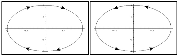 (Izquierda) Representación de una polarización elíptica dextrógira. (Derecha) Representación de una polarización elíptica levógira.